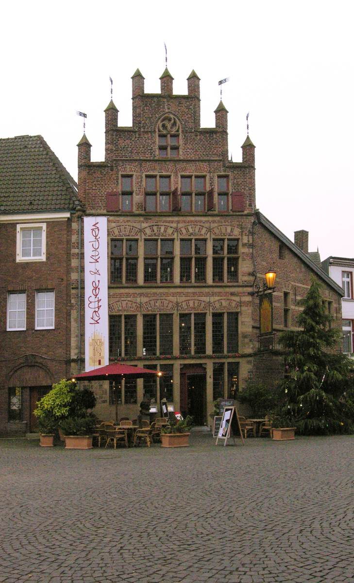 "Gotisches Haus" in Xanten